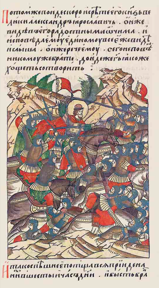 Невская битва Лицевой летописный свод (том 6 стр. 28). И тогда, еще поспешнее устремившись, напал Александр на неприятелей в шестом часу дня; и была битва [большая с римлянами; и убили новгородцы множество бесчисленное римлян; и самому королю князь Александр сделал шрам на лице острым своим мечом. Тогда же проявили себя в войске великого князя Александра Ярославовича 6 храбрецов, которые с ним рядом мужественно сражались.]